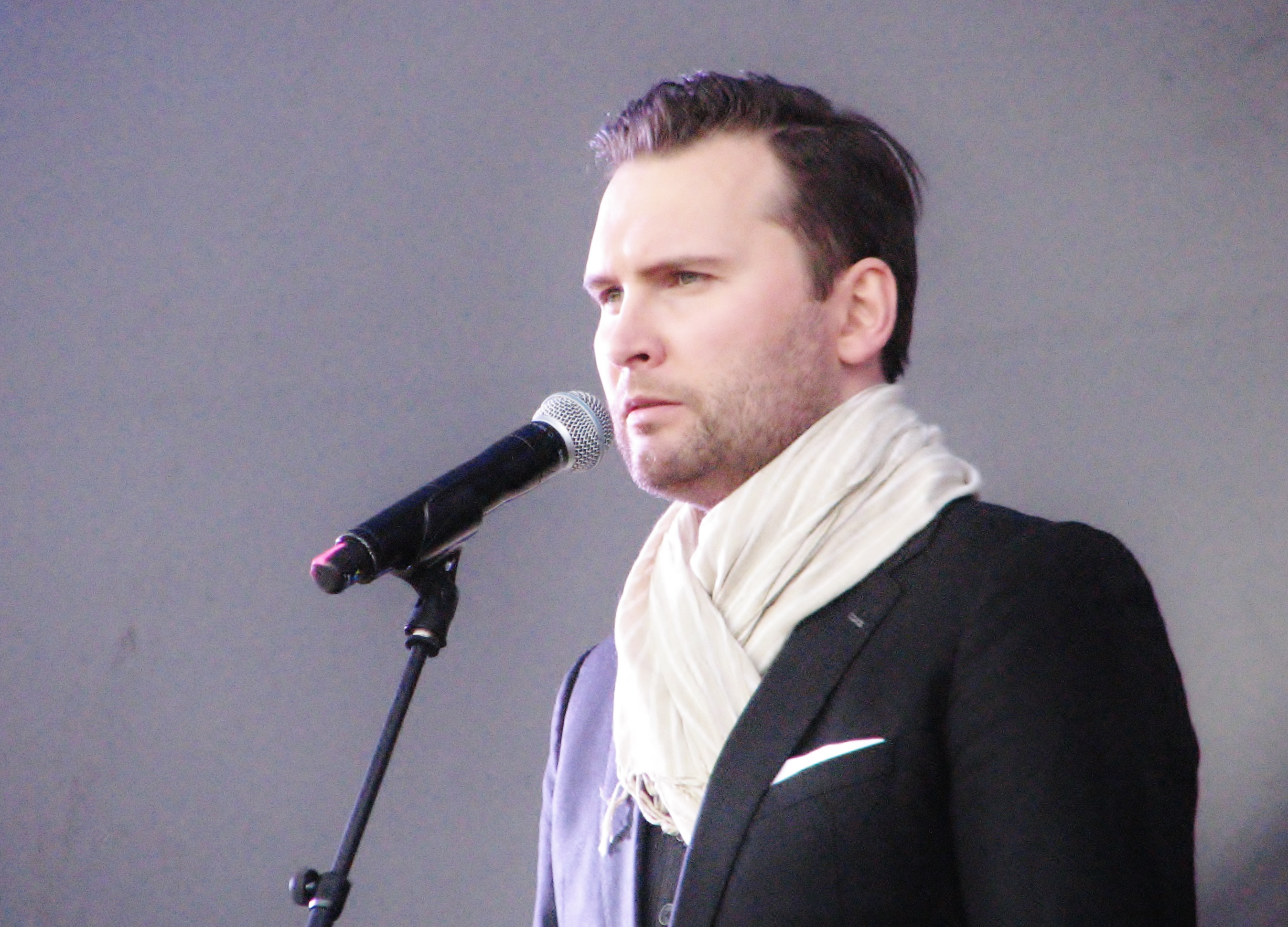 Koit Toome esinemas Tallinna päeval Vabaduse väljakul